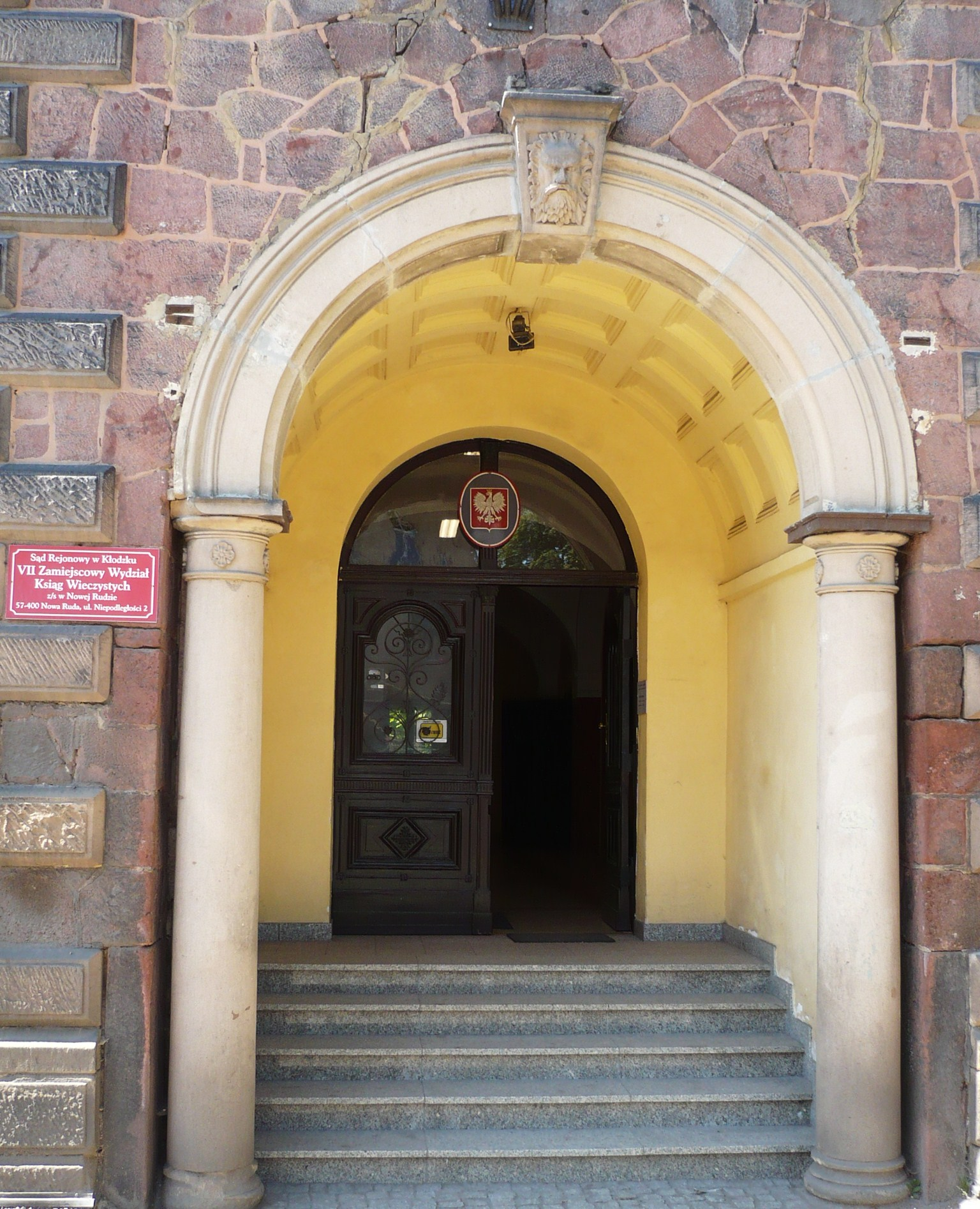 Nowa Ruda, ul. Niepodległości 2 - pierwotnie budynek starostwa powiatowego, następnie siedziba szkoły milicyjnej, sądu, prokuratury, kolegium ds. wykroczeń, komornika, Gminnego Ośrodka Pomocy Społecznej, Rady Gminy Nowa Ruda, obecnie VII Zamiejscowy Wydział Ksiąg Wieczystych i świetlica kuratorska, 1877